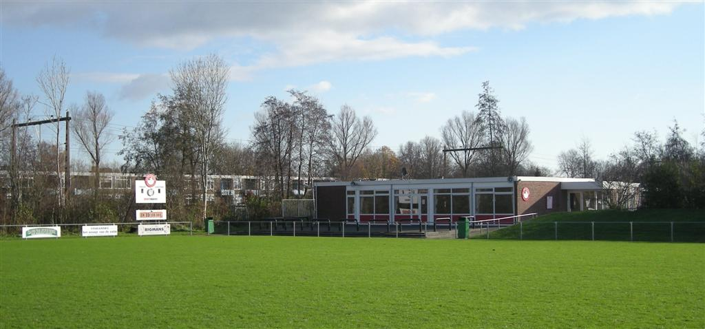 voetbalveld VV Nieuweschoot in de wijk De Greiden te Heerenveen